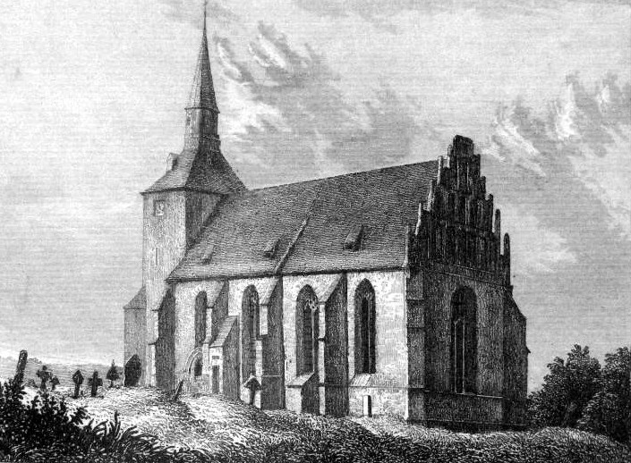 Stahlstich der Kirche zu Leubnitz, heute Kirche Leubnitz-Neuostra